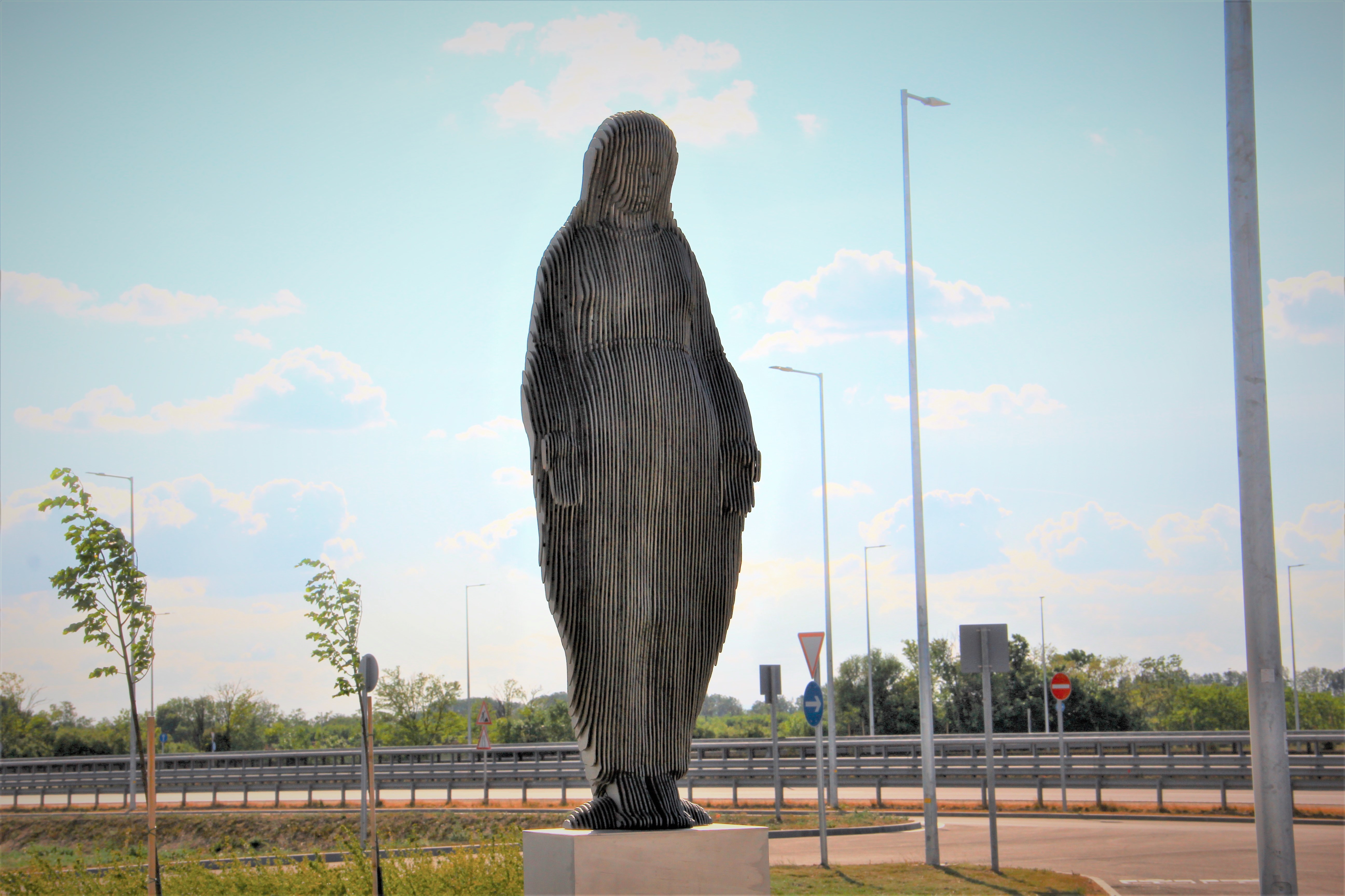 Alkotás a Rábaköz pihenőhelyen